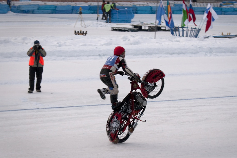 Финал личного чемпионата Европы по мотогонкам на льду. Тольятти. Россия